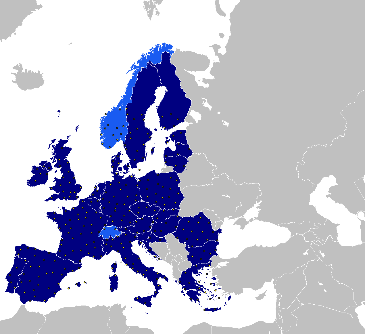 Funkstandorte des European Aviation Networks